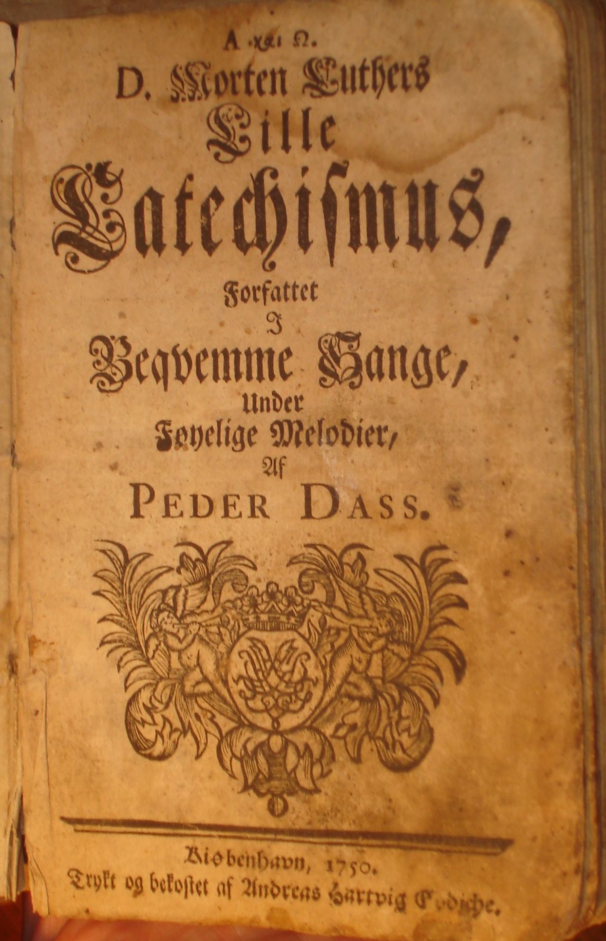 På 1700-talet kom det fleire utgåver av Petter Dass sine katekismesongar. Her tittelblad av utgåve frå 1750, etter foto i Årbok for Helgeland 2006. Petter Dass sine katekismesongar var den av bøkene hans som vart mest seld på 1700 talet.